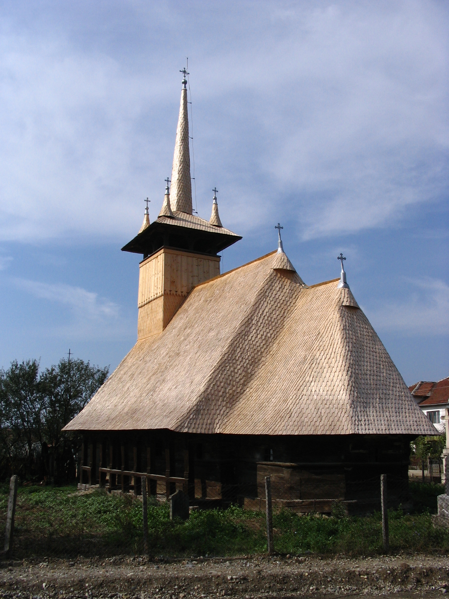 Biserica de lemn din Derşida